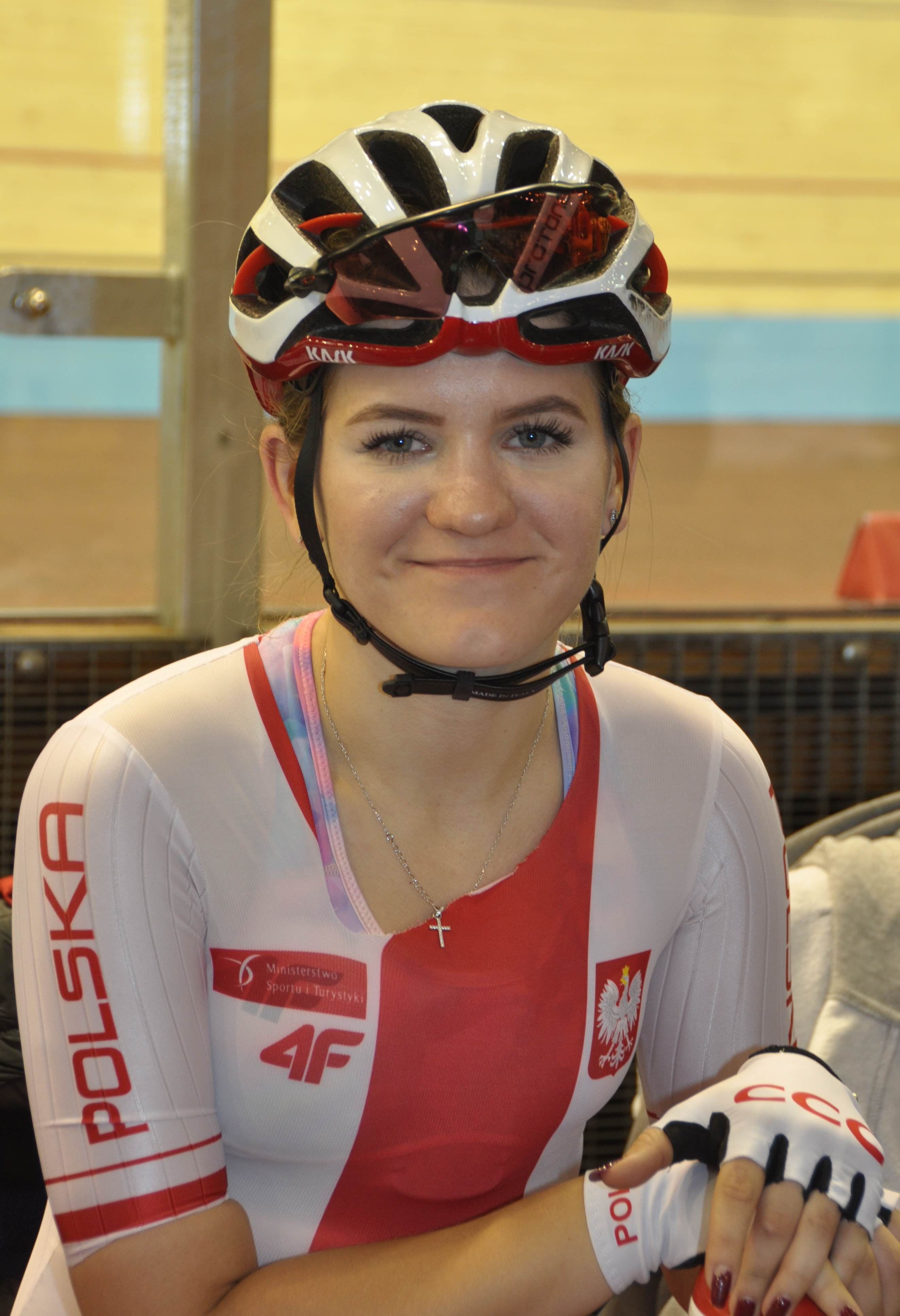 Wiktoria Pikulik, polnische Radsportlerin